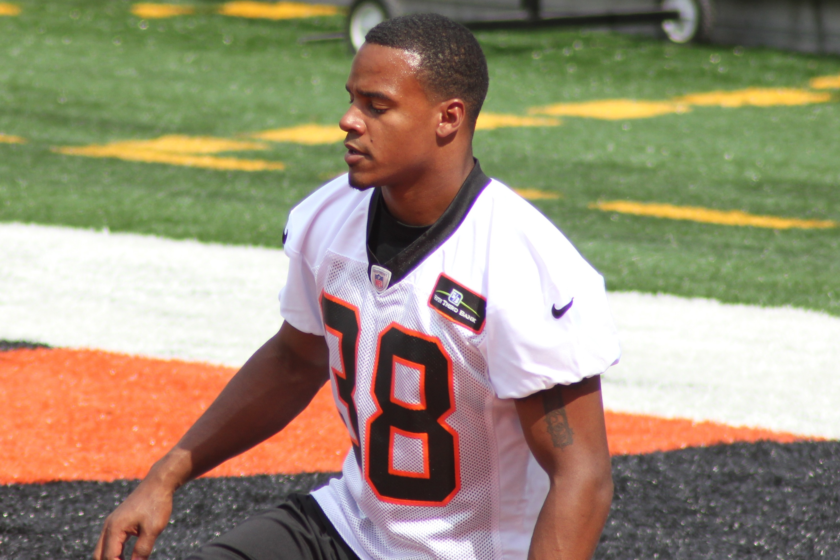 CB Shaun Prater